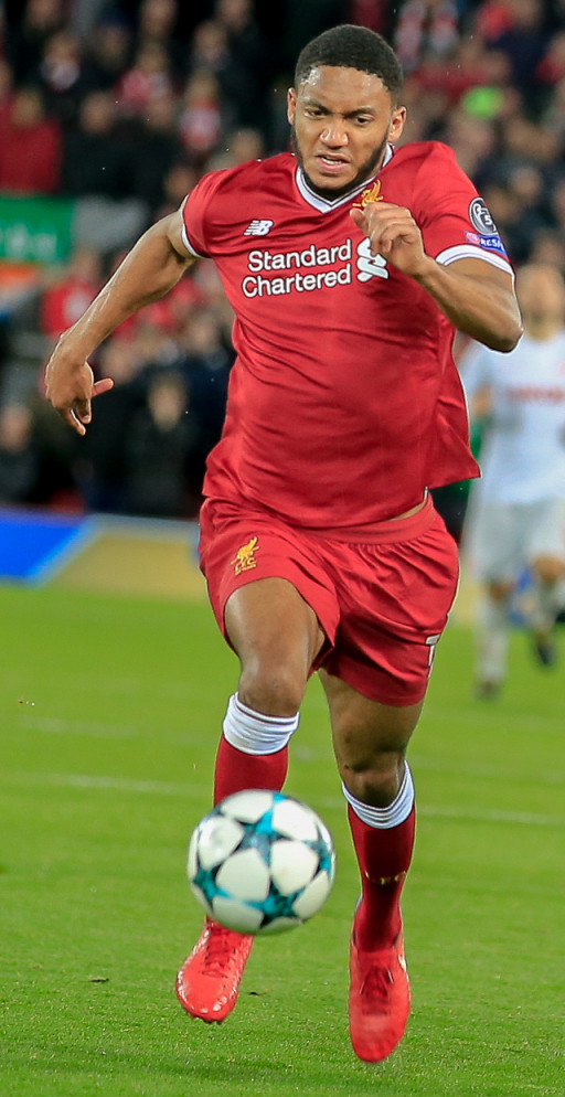 Прощание с Лигой чемпионов и грандиозное фиаско